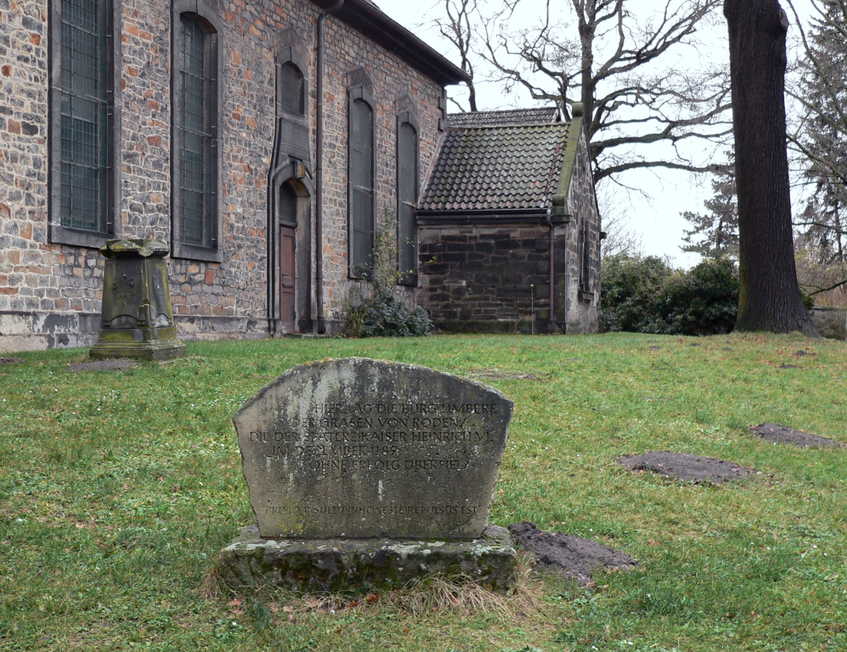 Gedenkstein für die Burg Limmer an der St.-Nikolai-Kirche (Limmer)